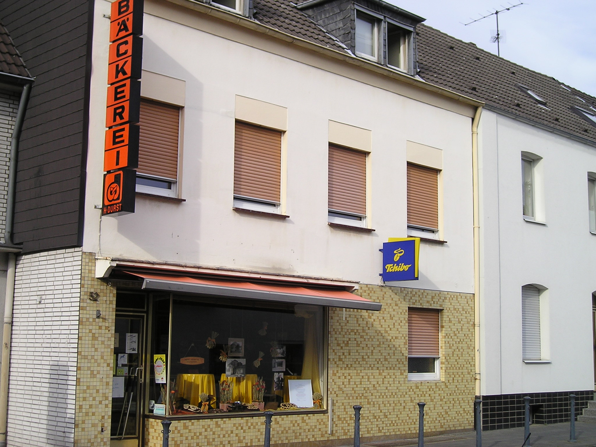 Die Bäckerei Durst in Monheim-Baumberg, die seit 100 Jahren besteht.